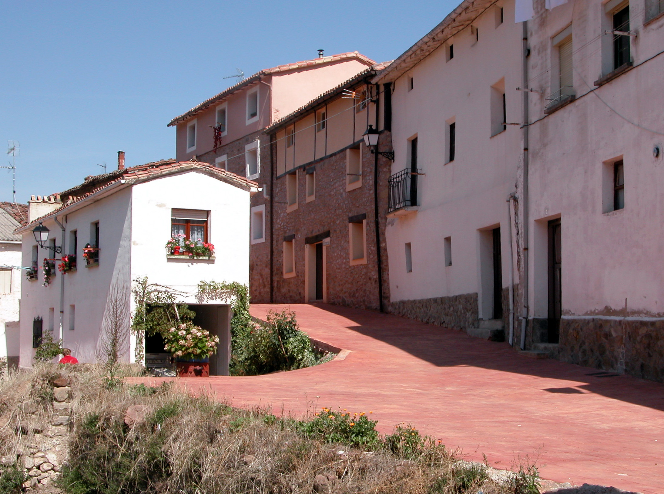 Santurdejo, municipio de La Rioja (España)